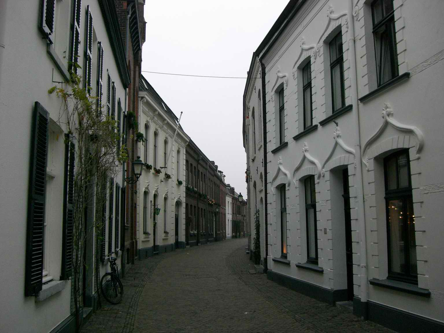 Begijnenhofstraat in Sittard.